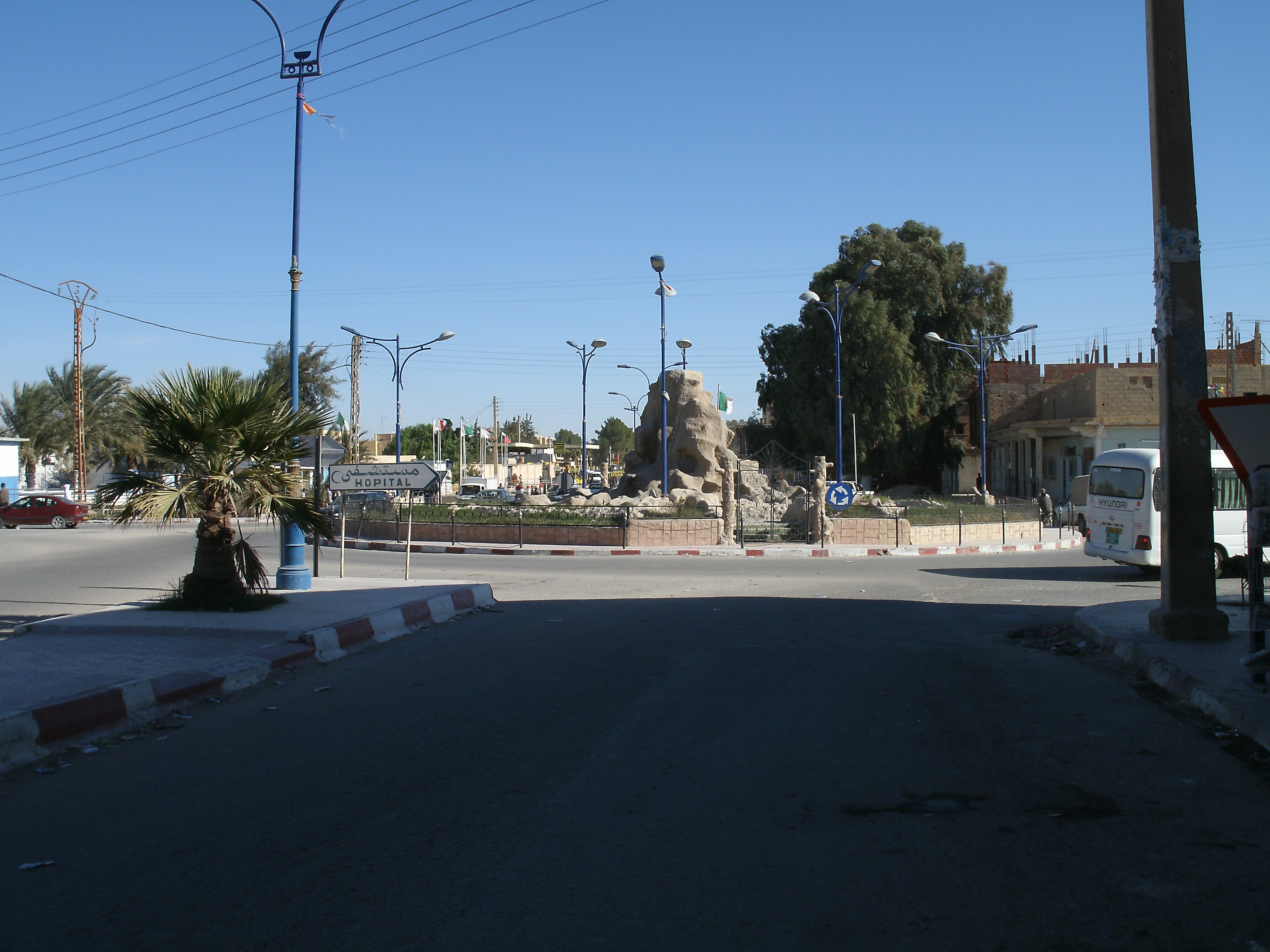 Rond point à Tolga